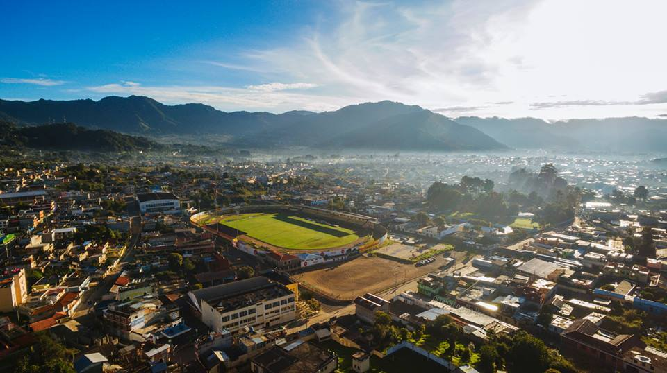 San Marcos City, Photography Guatemala